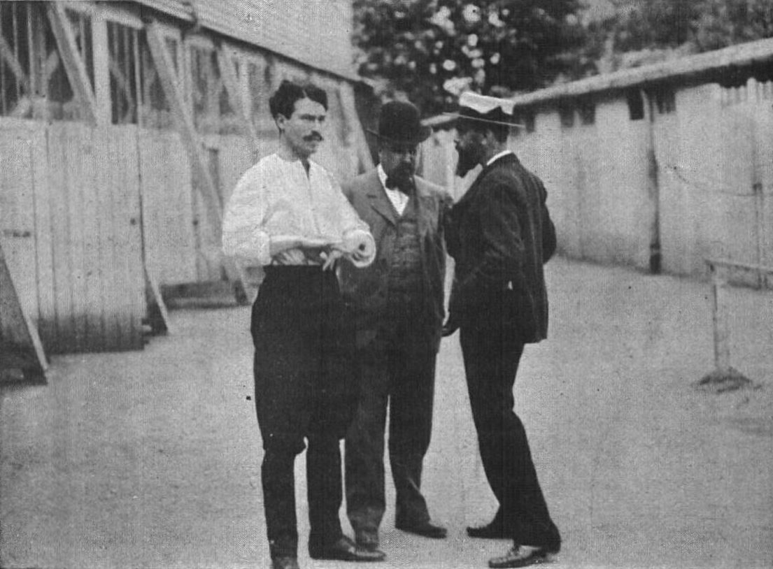 "M. Laberdesque" [conférant avec ses témoins : Maurice Charnay et Bounet].